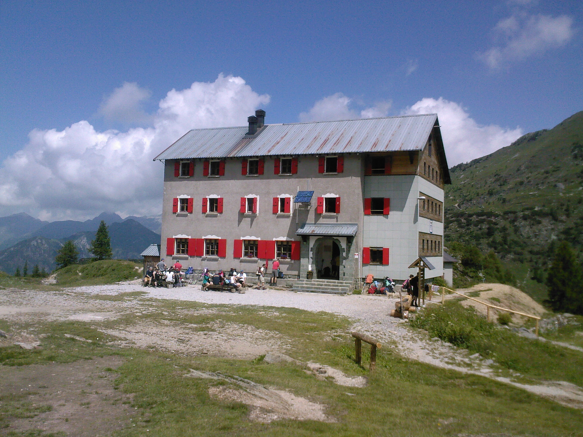 Rifugio Laghi Gemelli, Orobie, Bergamo. Estate 2008.